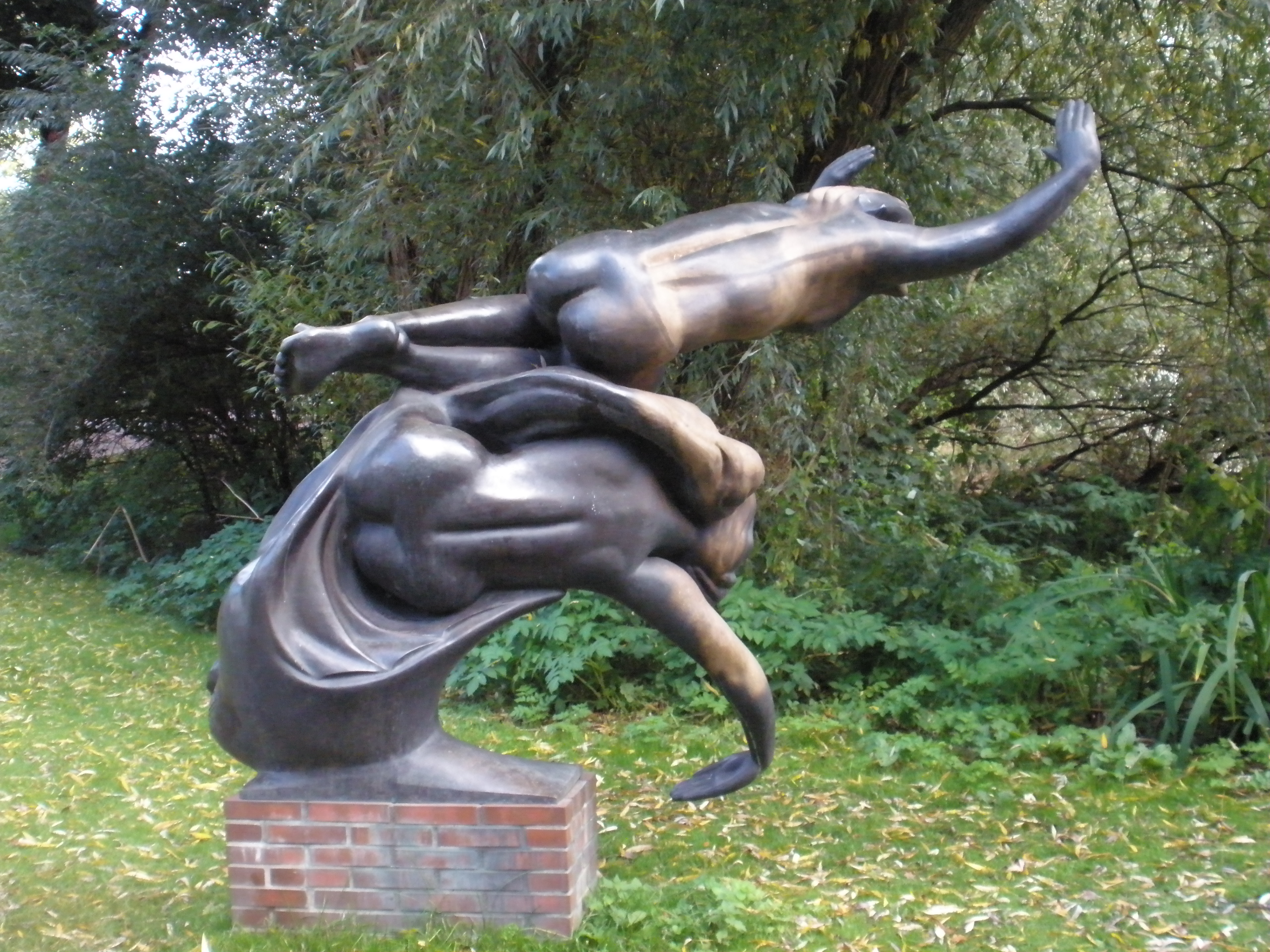 skulptur ätherwelle von friedrich wield 1933 - denkmal für heinrich hertz hamburg eichenpark harvestehude alster, standort derzeit NDR-Funkhaus, Rotherbaum